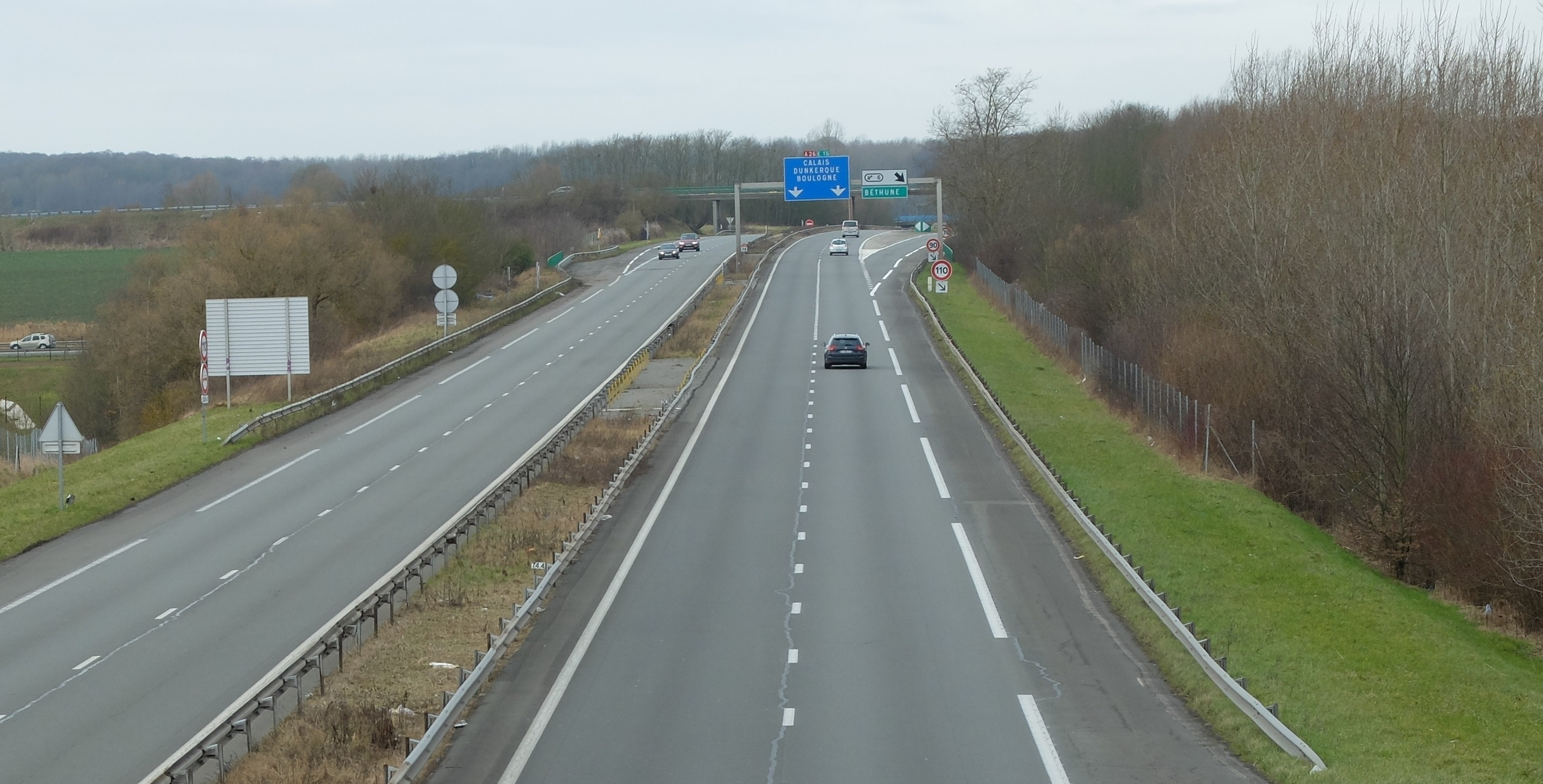 Vue de l'autoroute française A26 à hauteur de la sortie 6 (Béthune) située sur le territoire de Fouquières-lès-Béthune (la sortie) et de Vaudricourt (ce qui précède). La voie de droite est dans le sens Reims-Calais.